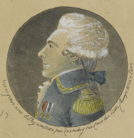 Jean Joseph de Rafélis, comte de Broves (1715-1782), amiral